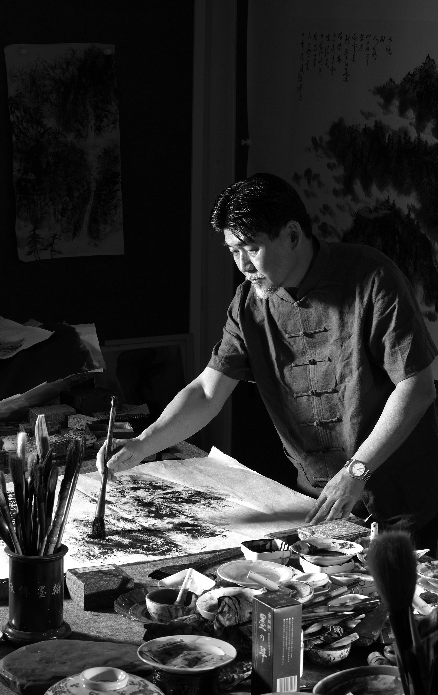 Dr Cheng Haw Chien Portrait